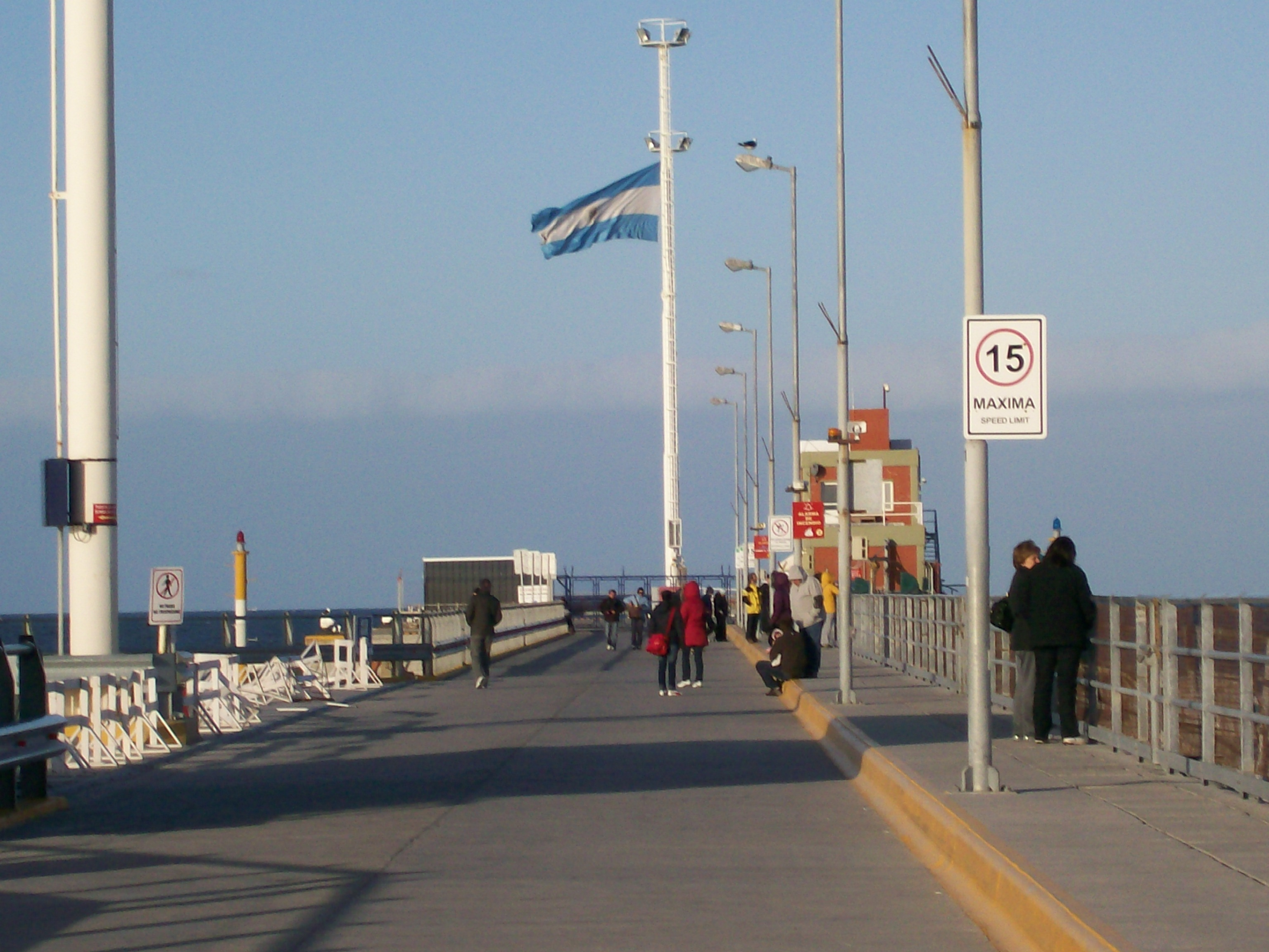 muelle